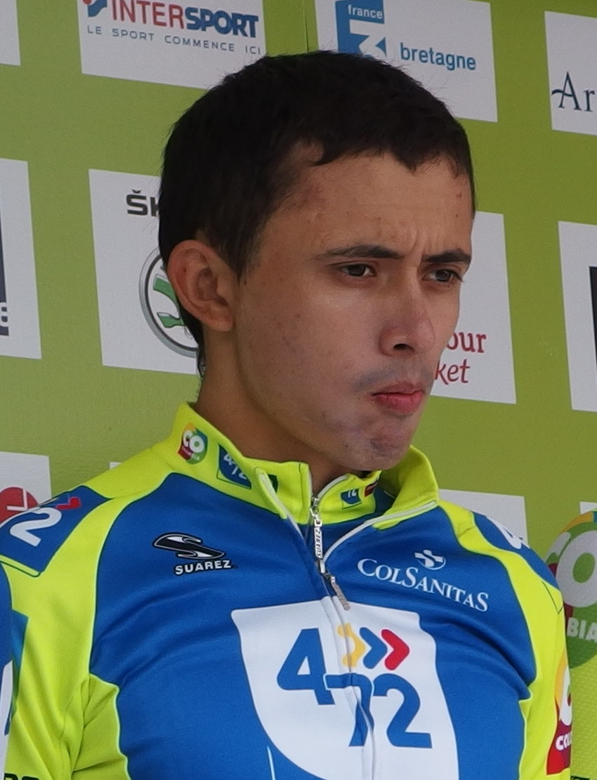 Tour de Bretagne 2014 - Présentation des équipes au départ de la sixième étape à Radenac - Équipe 472-Colombia Depicted person: Fernando Orjuela